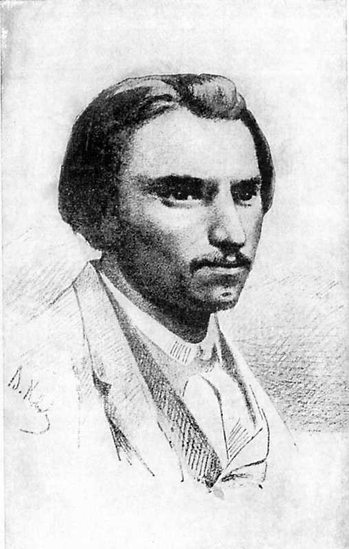 Руданський Степан Васильович, портрет